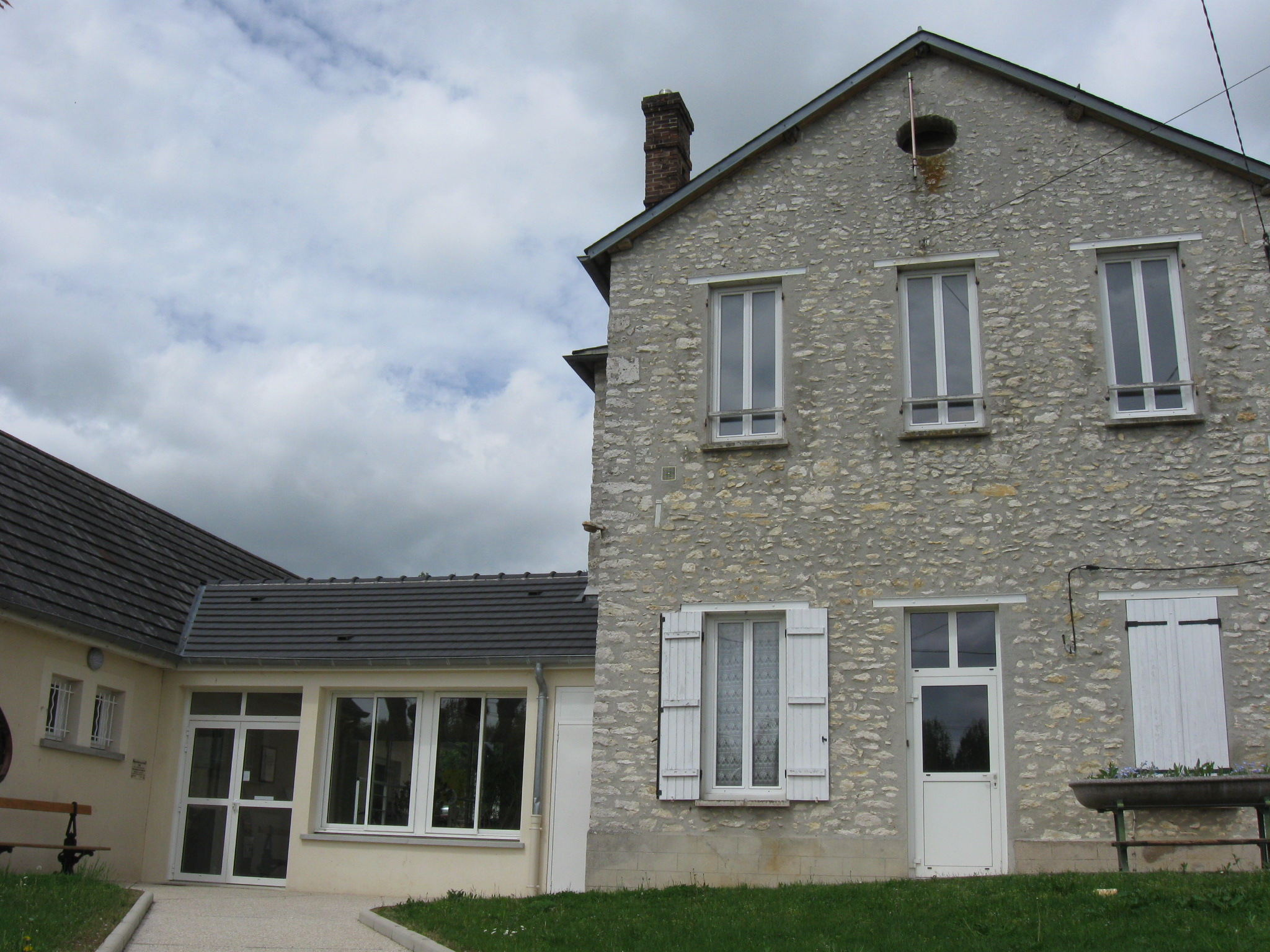 Mairie de Saint-Loup-de-Naud située à Courton-le-Bas. (département de la Seine et Marne, région Île-de-France).